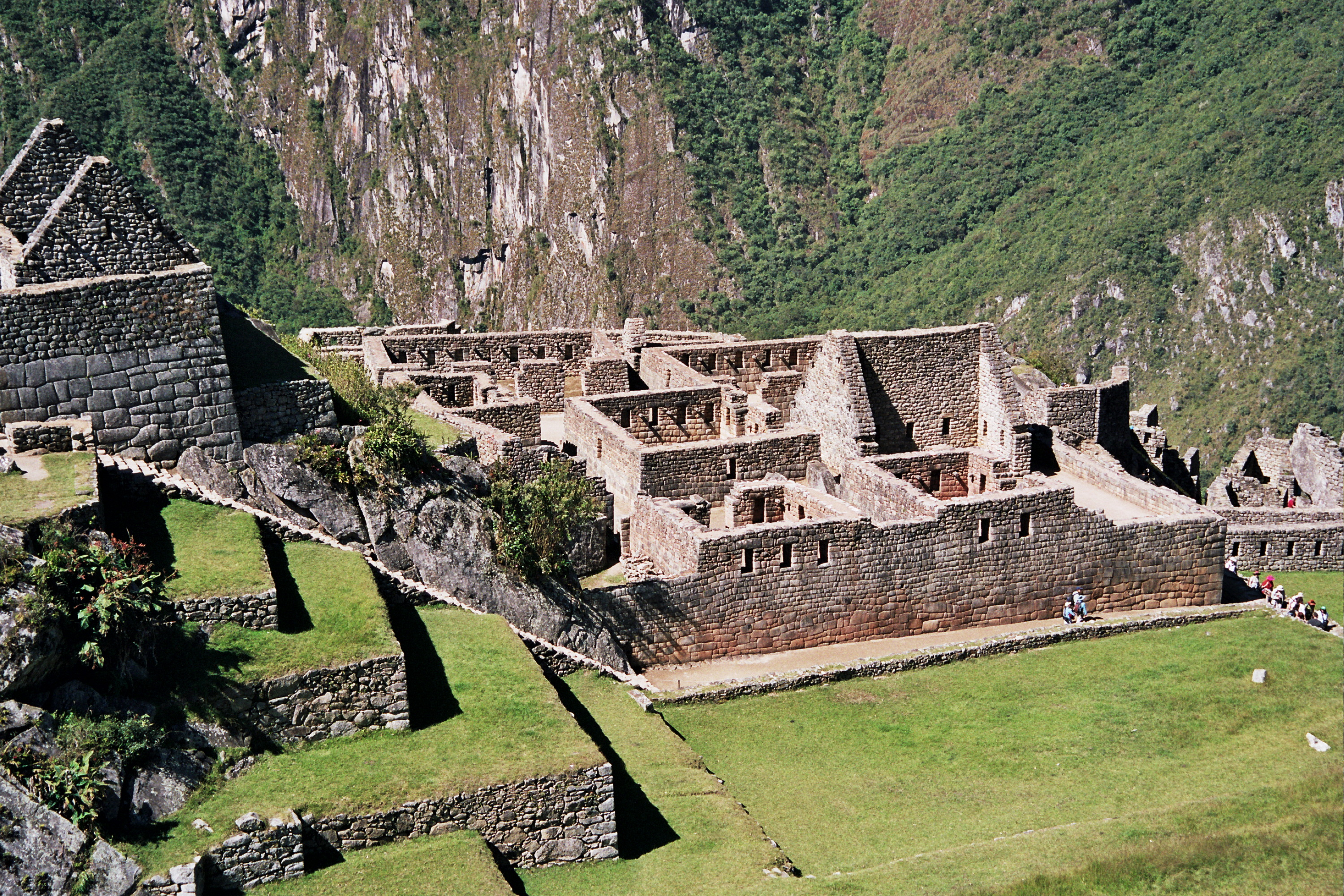 Beschreibung: Machupicchu-Blick auf das "Viertel der Handwerker" Quelle: selbst fotografiert Fotograf: Thomas Pätzold (paetzoldthomas) Datum: Mai 2006 andere Versionen: keine